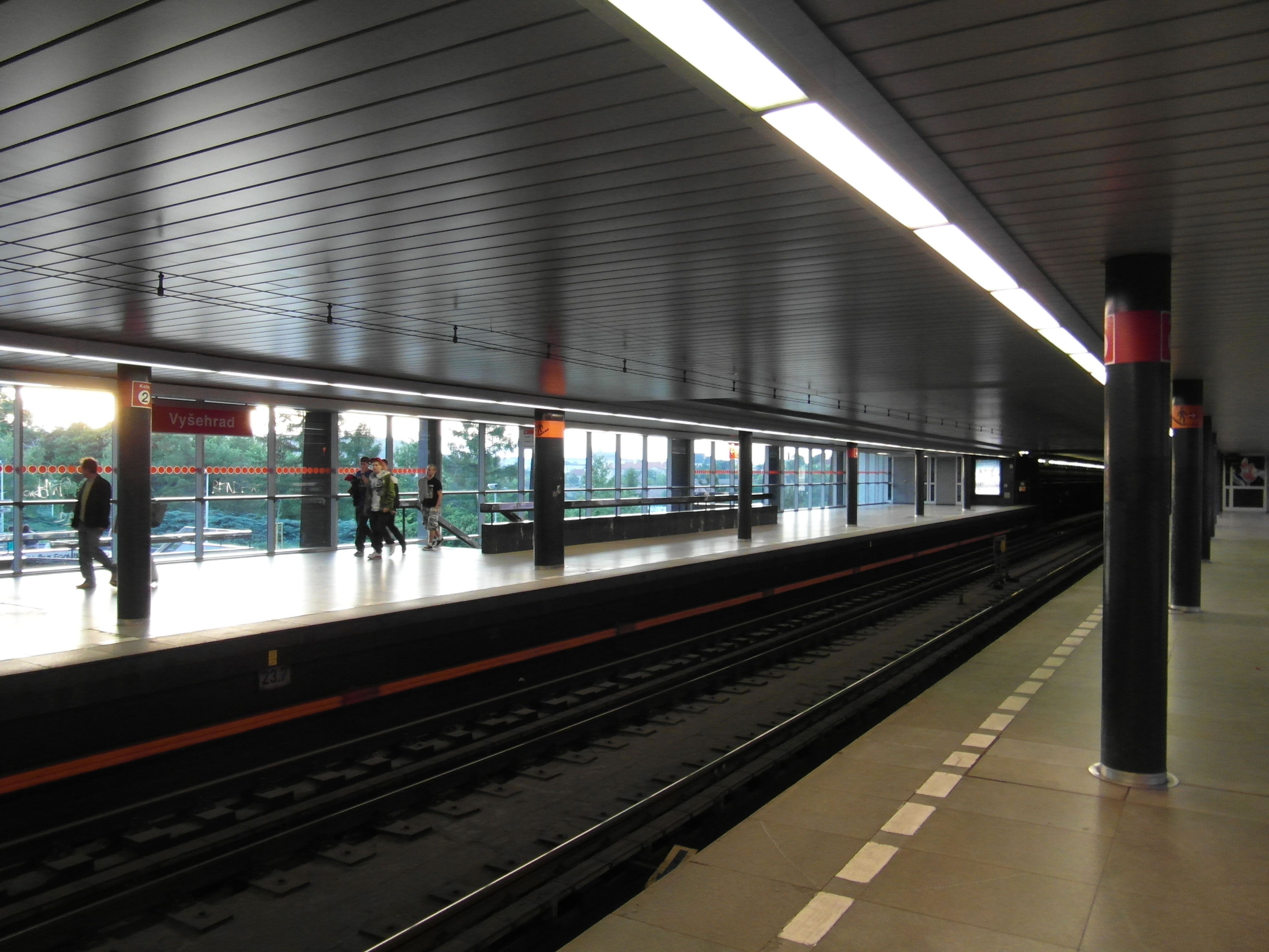 Praha - Metro - Vyšehrad